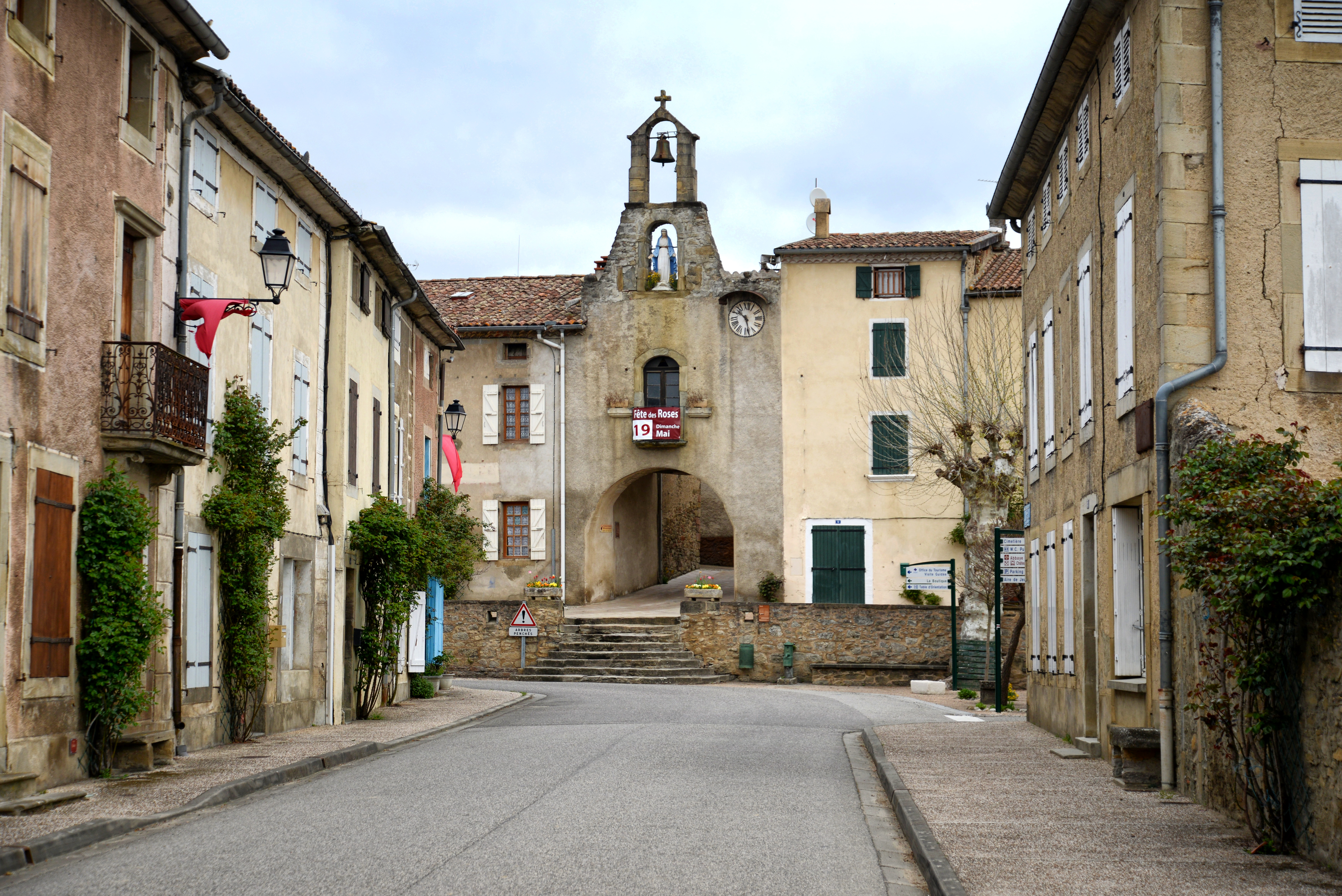 Camon, Ariège (Midi-Pyrénées, France) - L'entrée principale du village fortifié.